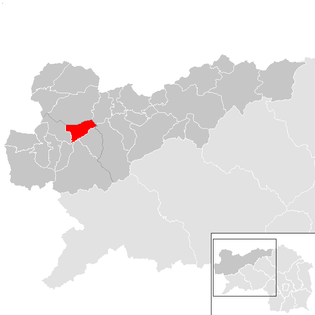 Lage von Mitterberg-Sankt Martin im Bezirk Liezen